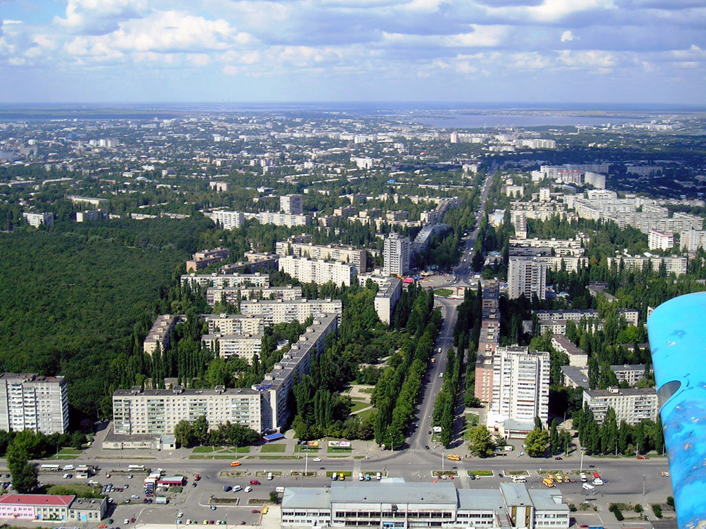 Залізничний вокзал